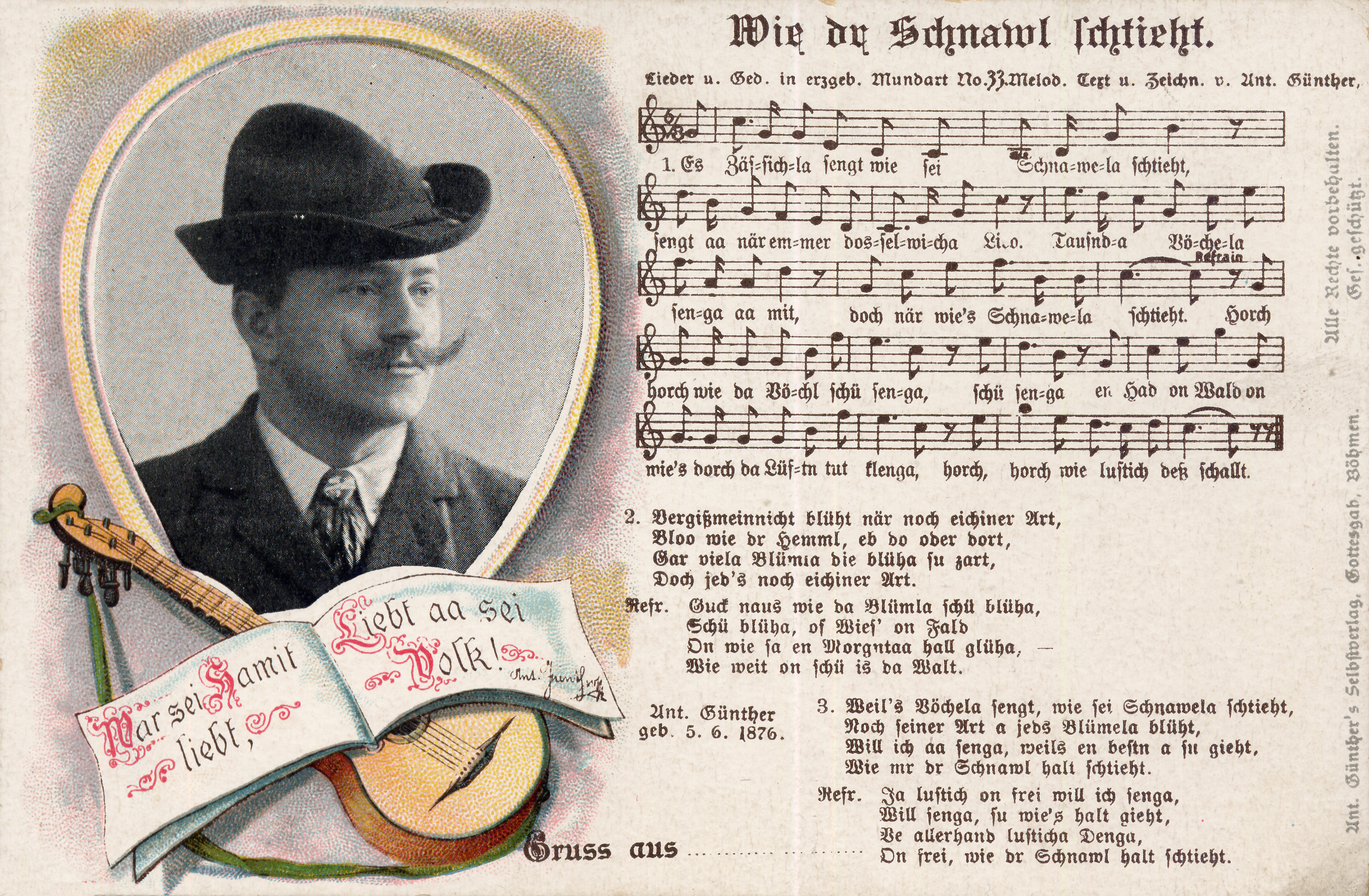 Wie dr Schnawl schtieht Nr. 33 mit Porträt 1911